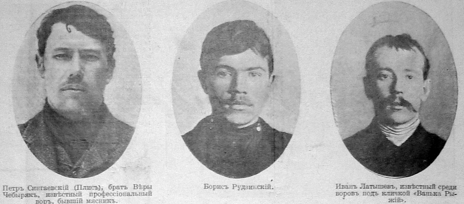 1. Пётр Сингаевский (Плис), брат Веры Чебыряк, профессиональный вор, бывший мясник; 2. Борис Рудзинский; 3. Иван Латышев, известный среди воров под кличкой "Ванька Рыжий"